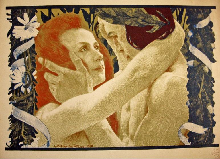 « Énigme (réflexion) », chromolithographie d'après un dessin et une gravure d'Henri Bellery-Desfontaines, une des 4 estampes en prime de la revue L'Estampe moderne [timbre], 1898.